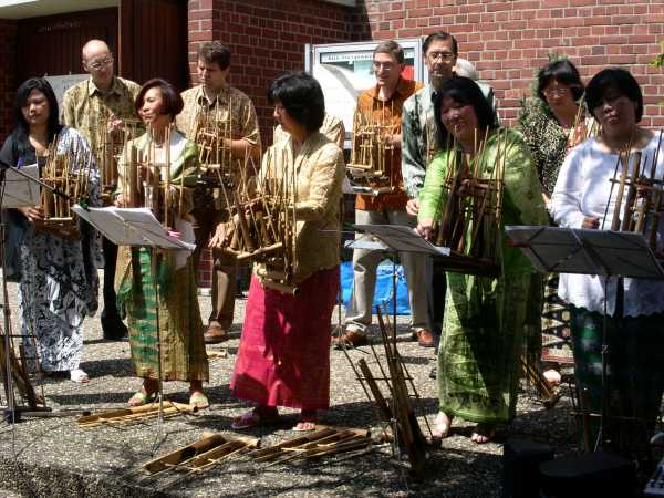 Die Group Angklung MKIF bei einem Auftritt auf einem Pfarrfest in Geinsheim bei Groß-Gerau. Der Autor dieser Zeilen ist der 4. von Links.